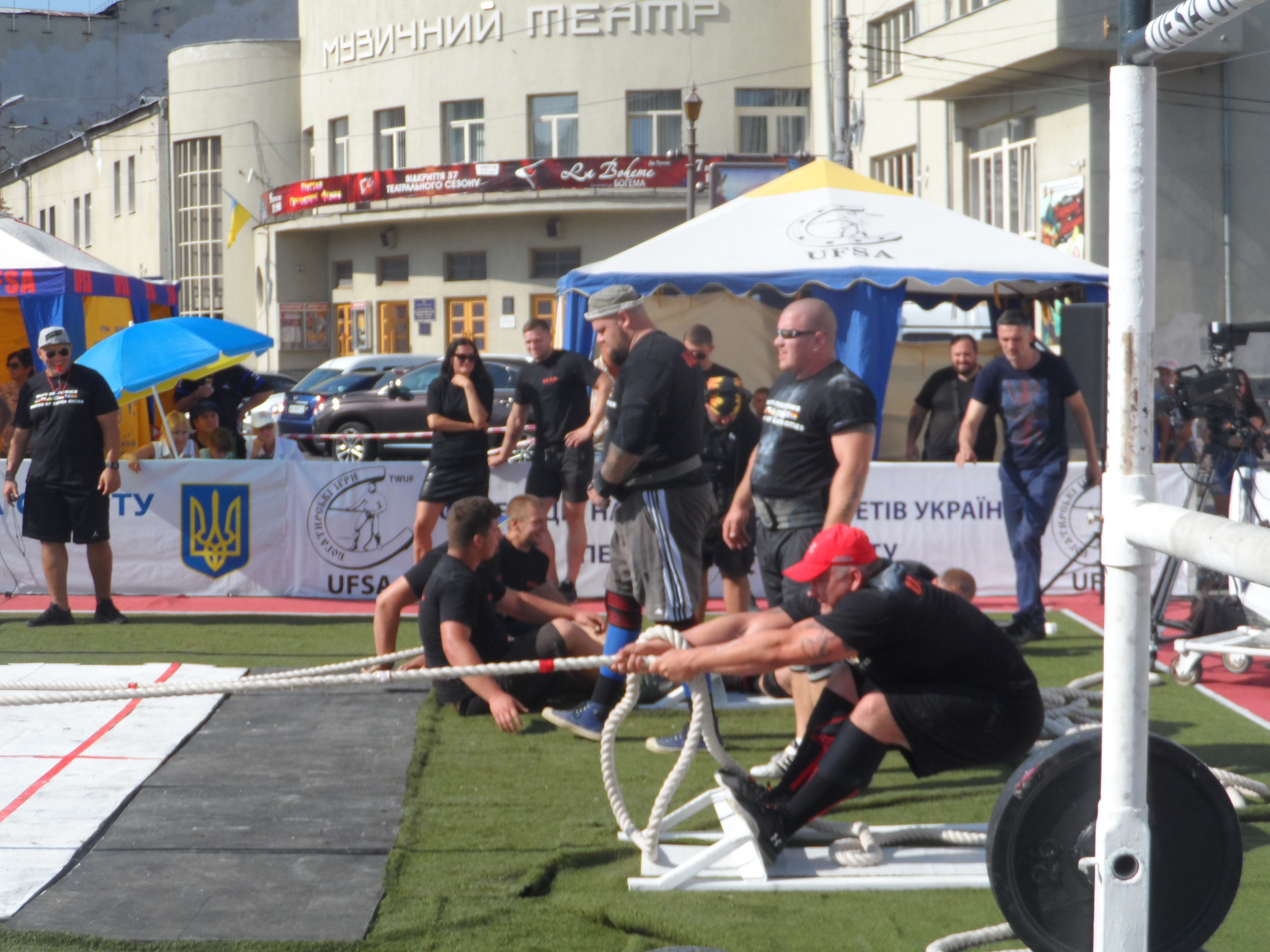 Киев (2018)